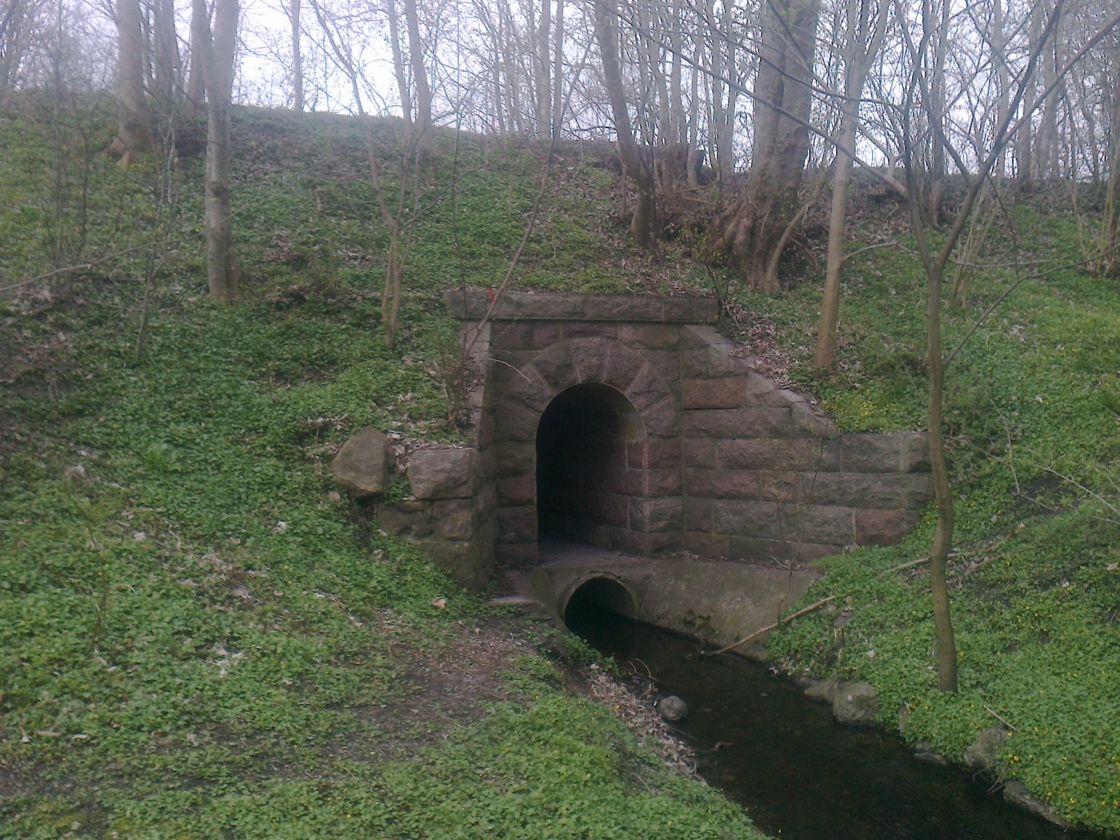 Stien går på en høj dæmning over Ballemølle Å. Terrænet er drænet på den anden side, så åen er sænket - derfor røret under den oprindelige åbning